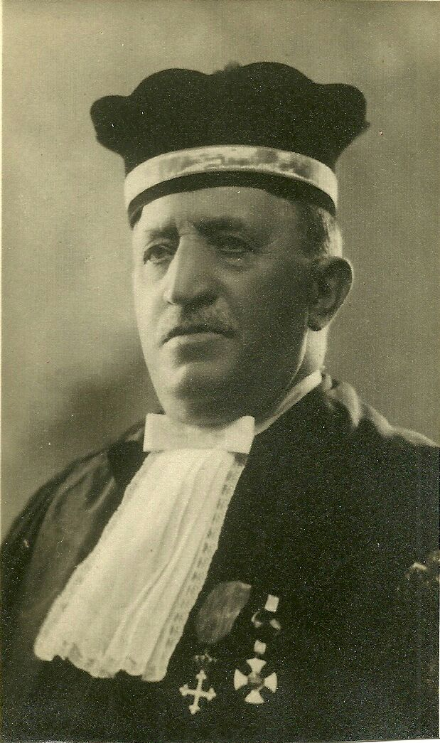 Umberto Colesanti, magistrato (Morcone 12/7/1863 - Roma 19/5/1942)